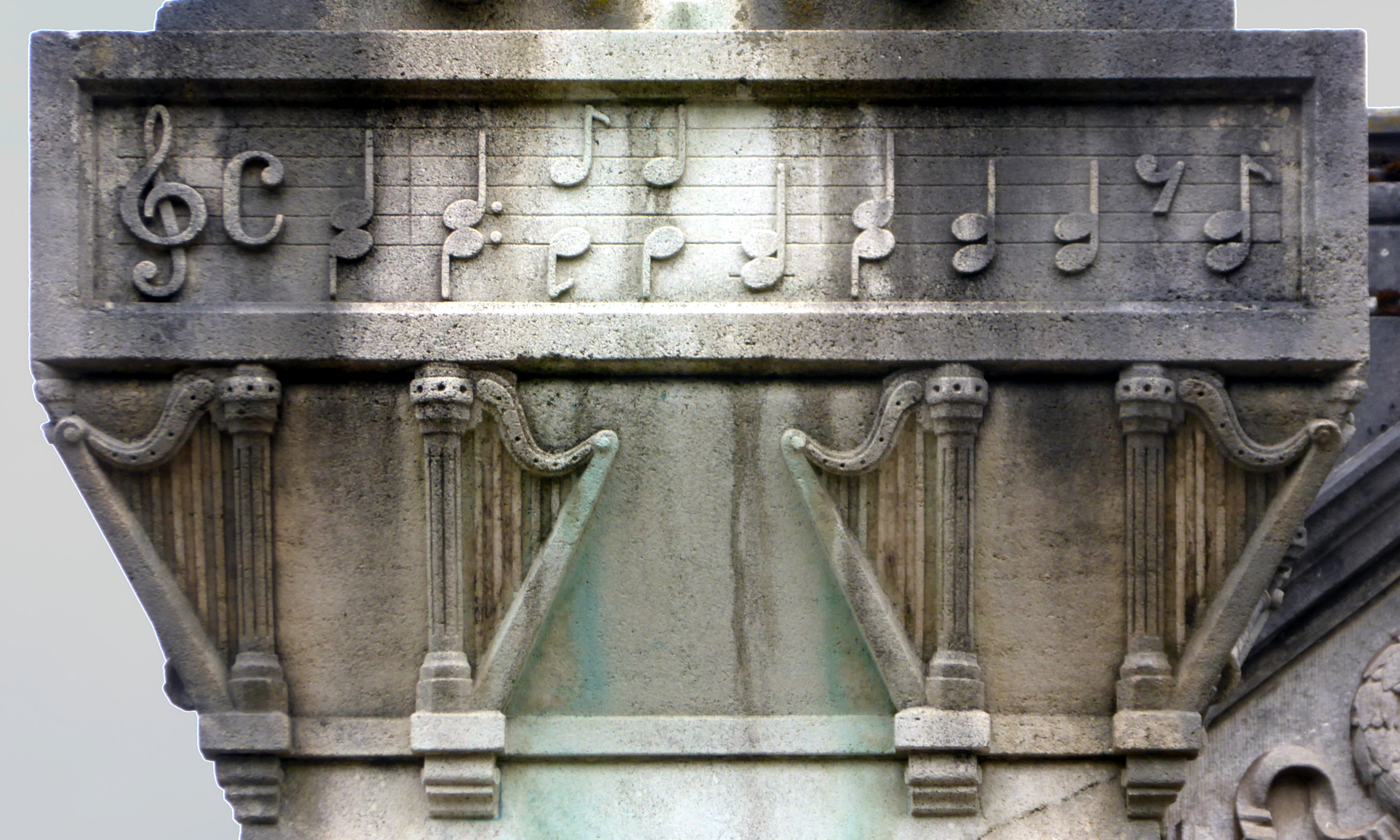 Luxemburg, Grab von Jean-Antoine Zinnen mit den ersten zwei Takten der von ihm komponierten Hymne Ons Heemecht.